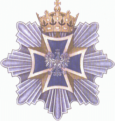 Krzyż Wielki Orderu Krzyża Wojskowego. Gwiazda orderowa.